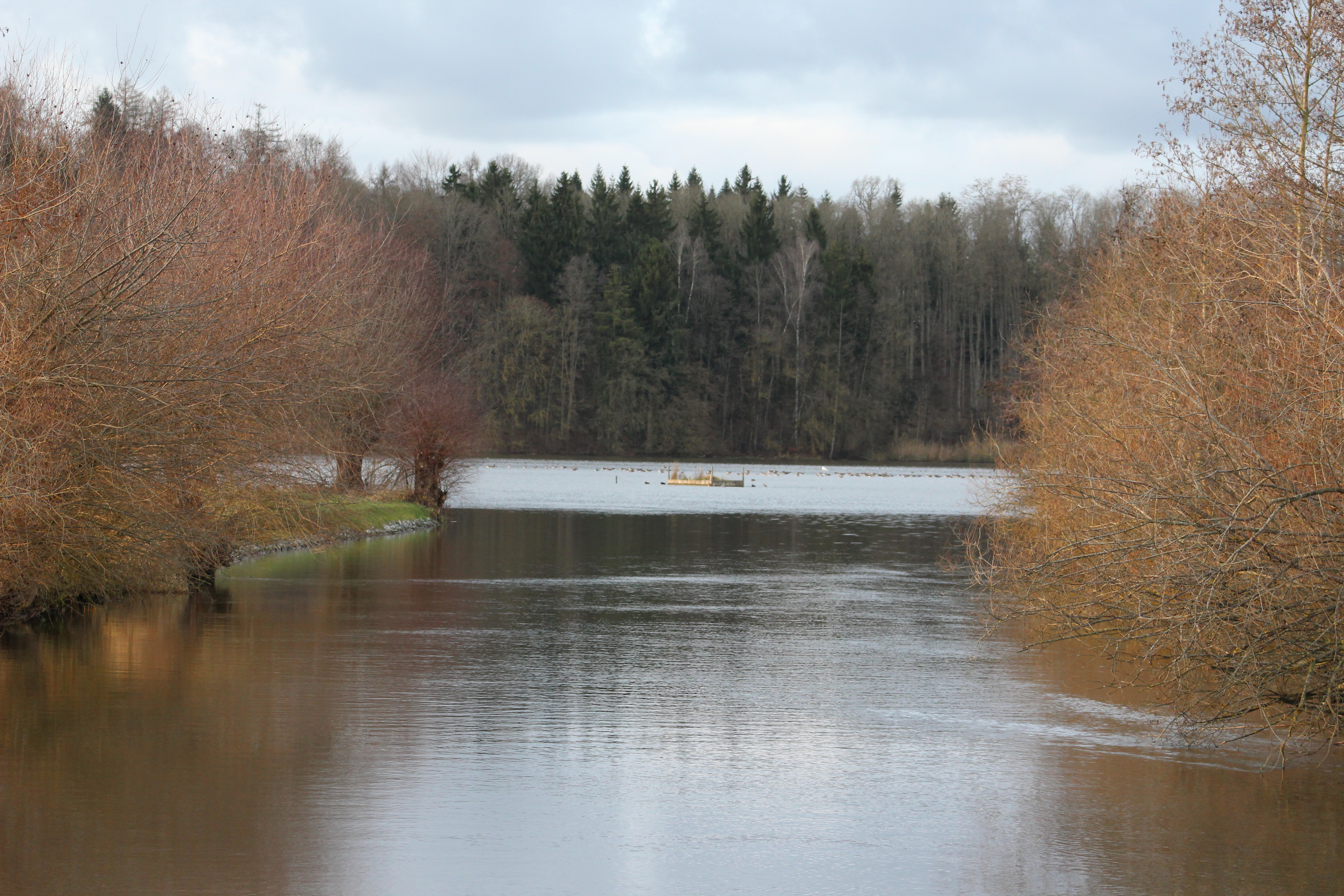 Zufluß der Günz in den Oberegger Stausee vom Wehr aus